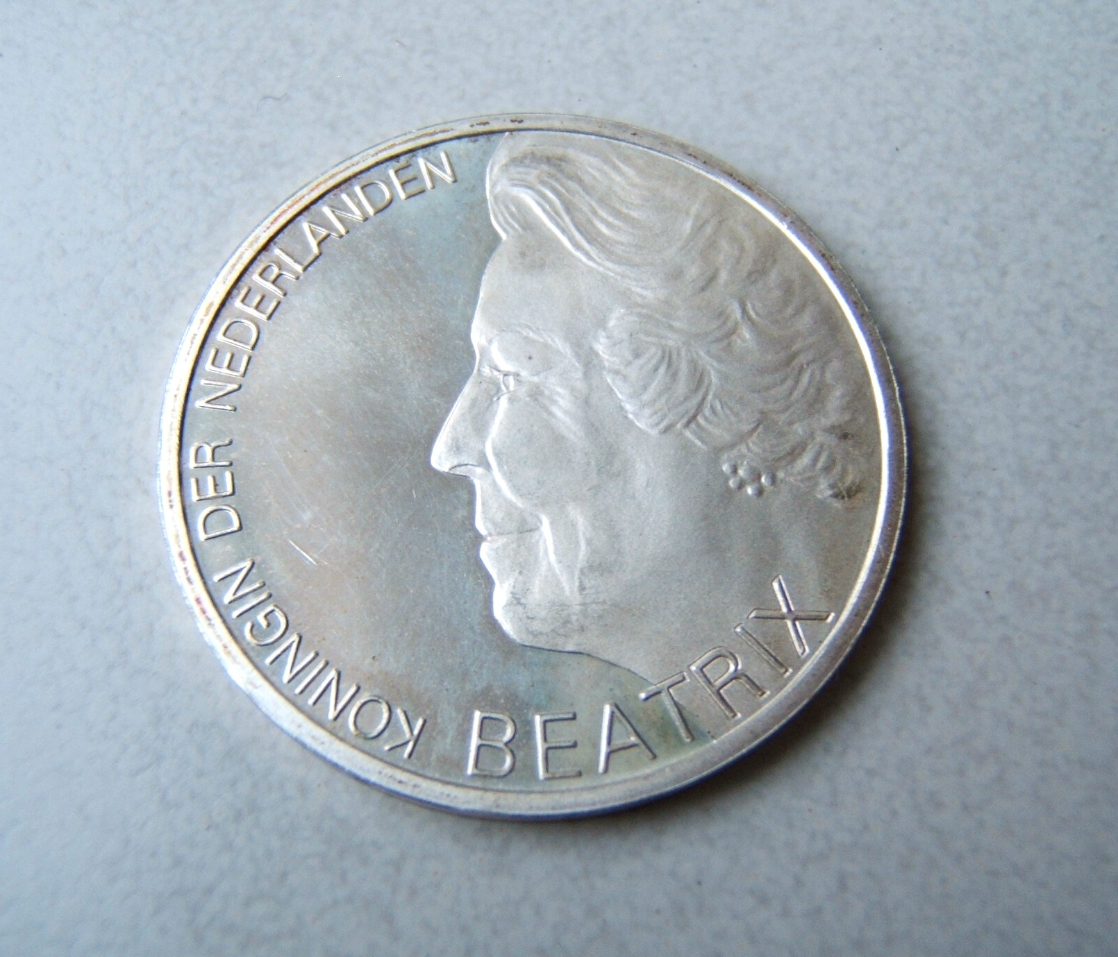 Nederlands zilveren tientje "Hugo de Groot", 1995; kopzijde